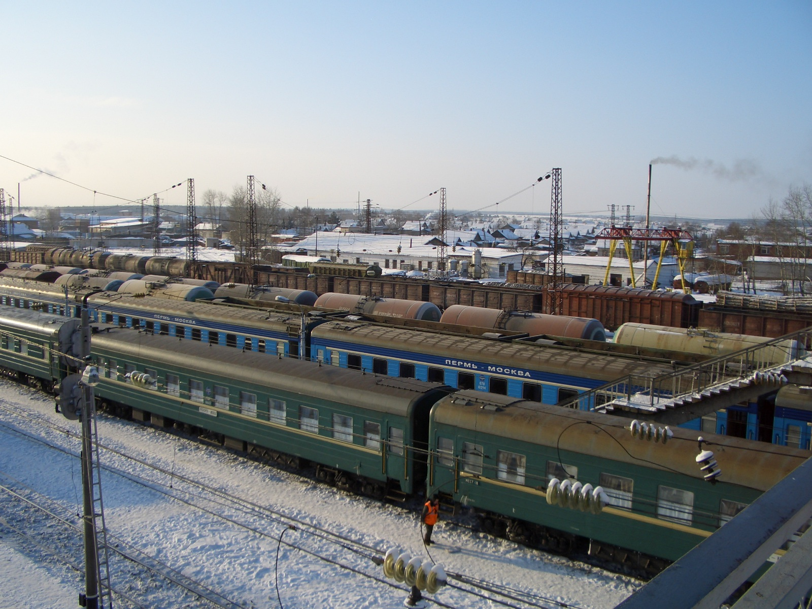 Trains at Balezino station